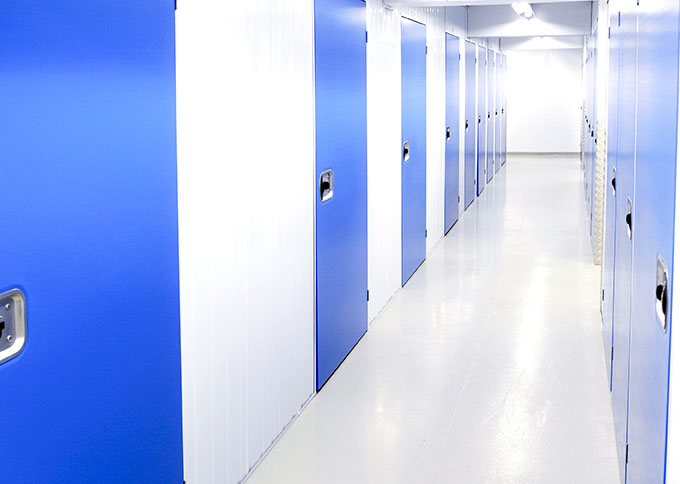 Jyväskylän Cityvaraston pienvarastoja.